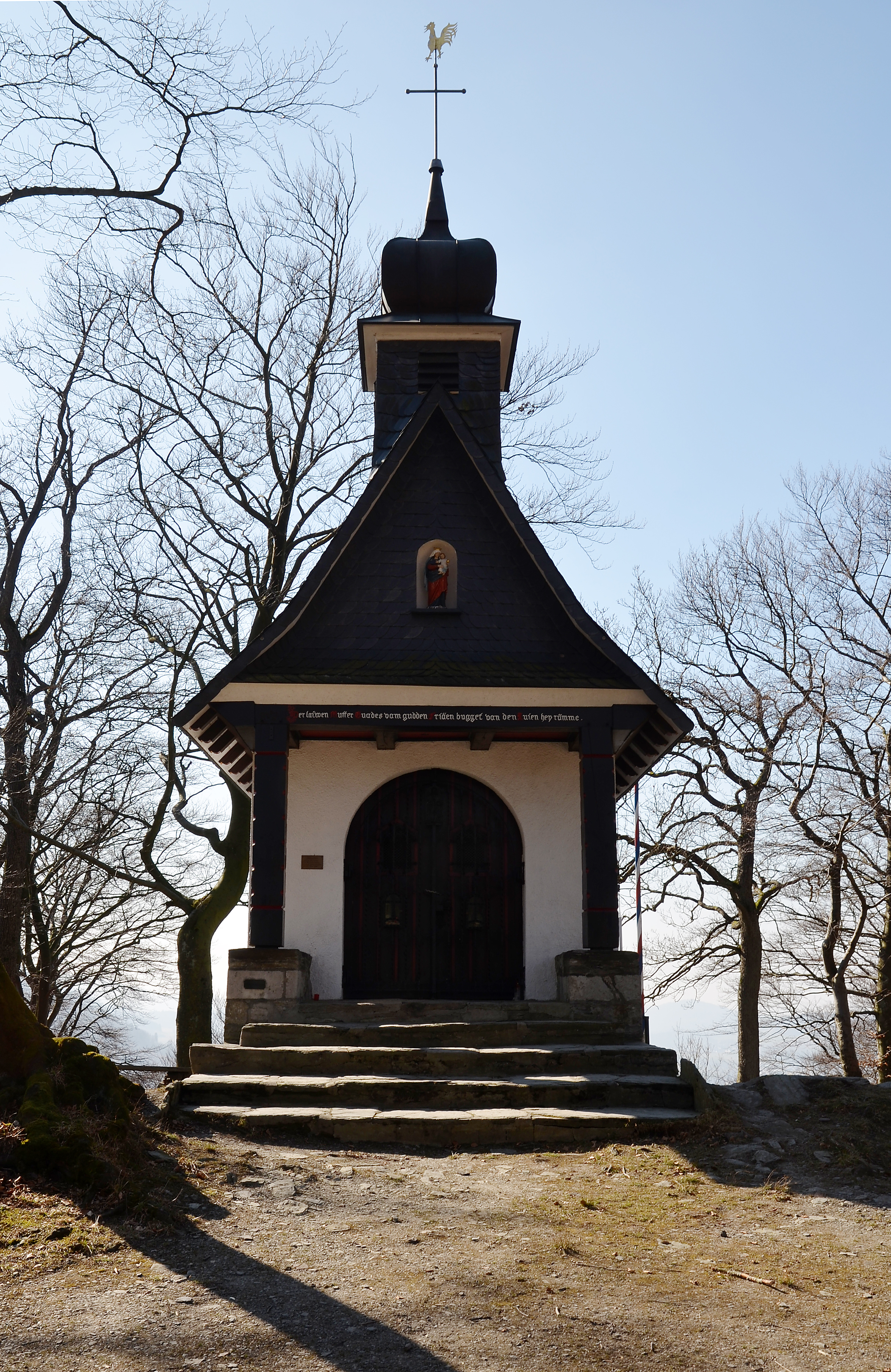 Die Kapelle wird in der Denkmalliste der Stadt Brilon unter 30. als Marienkapelle von 1920 geführt.